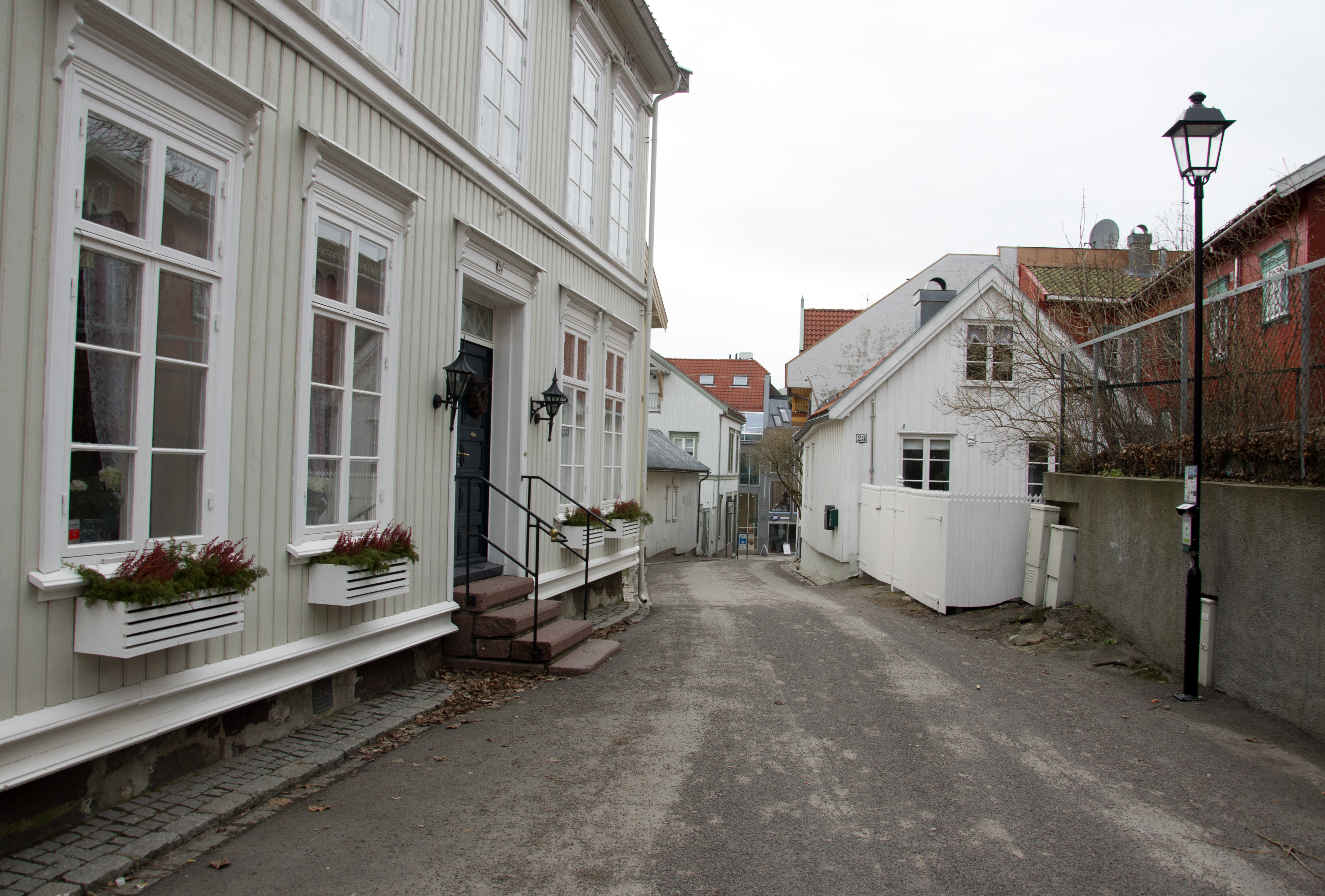 Graabrødregaten, Tønsberg